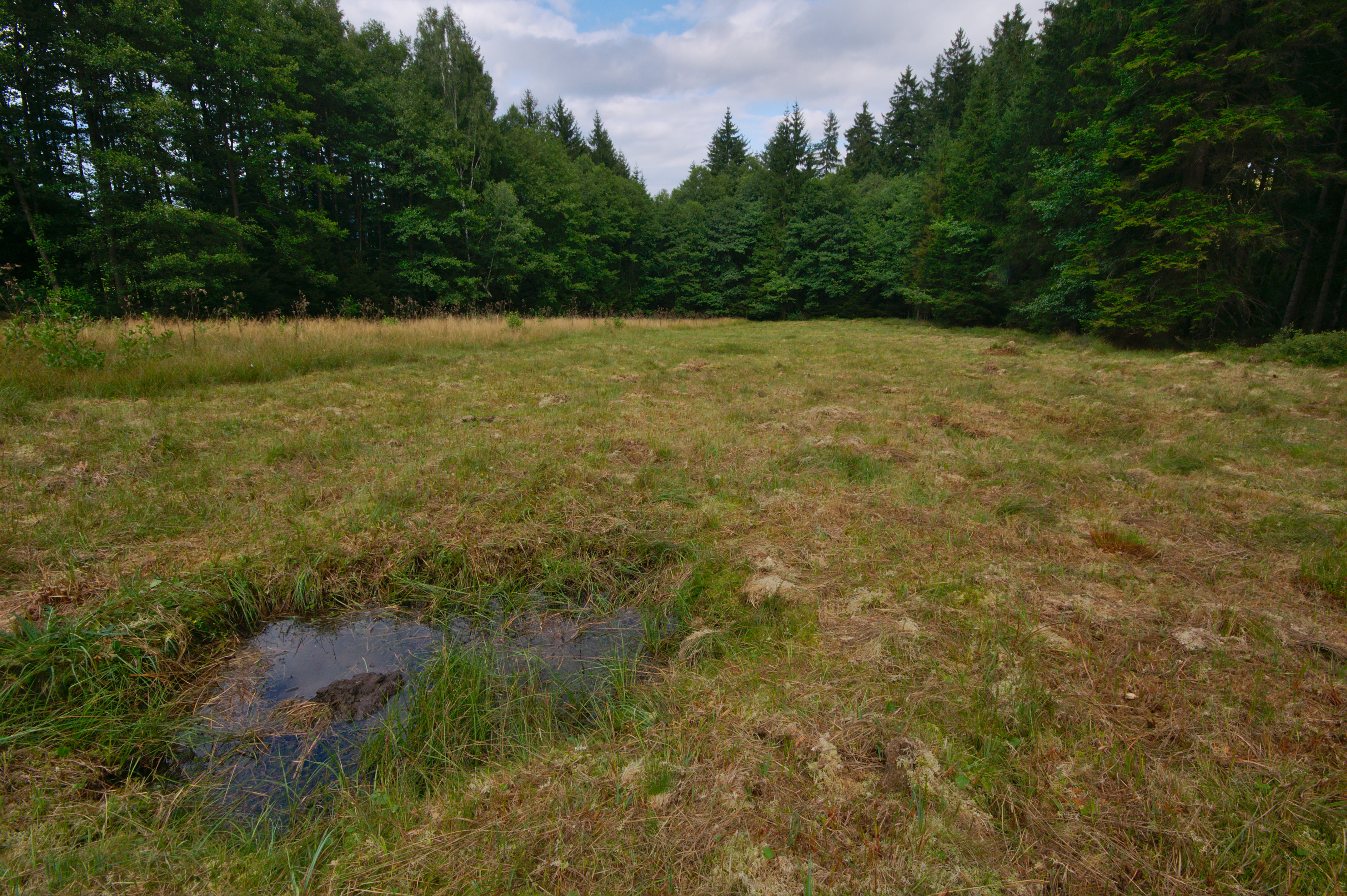 Přírodní památka Rašeliniště pod Předním vrchem, okres Ústí nad Orlicí